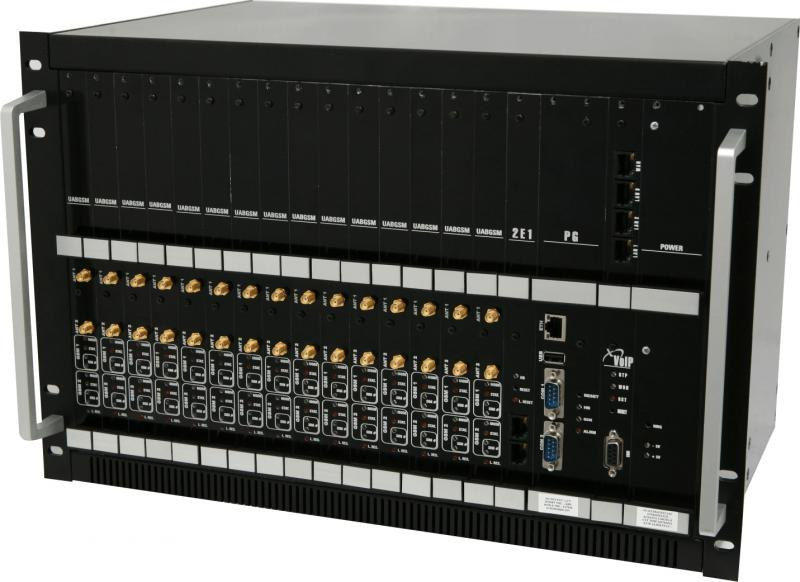 многоканальный GSM/CDMA-VoIP-ISDN шлюз (мультишлюз) Topex MultiAccess (до 30 GSM/CDMA каналов)